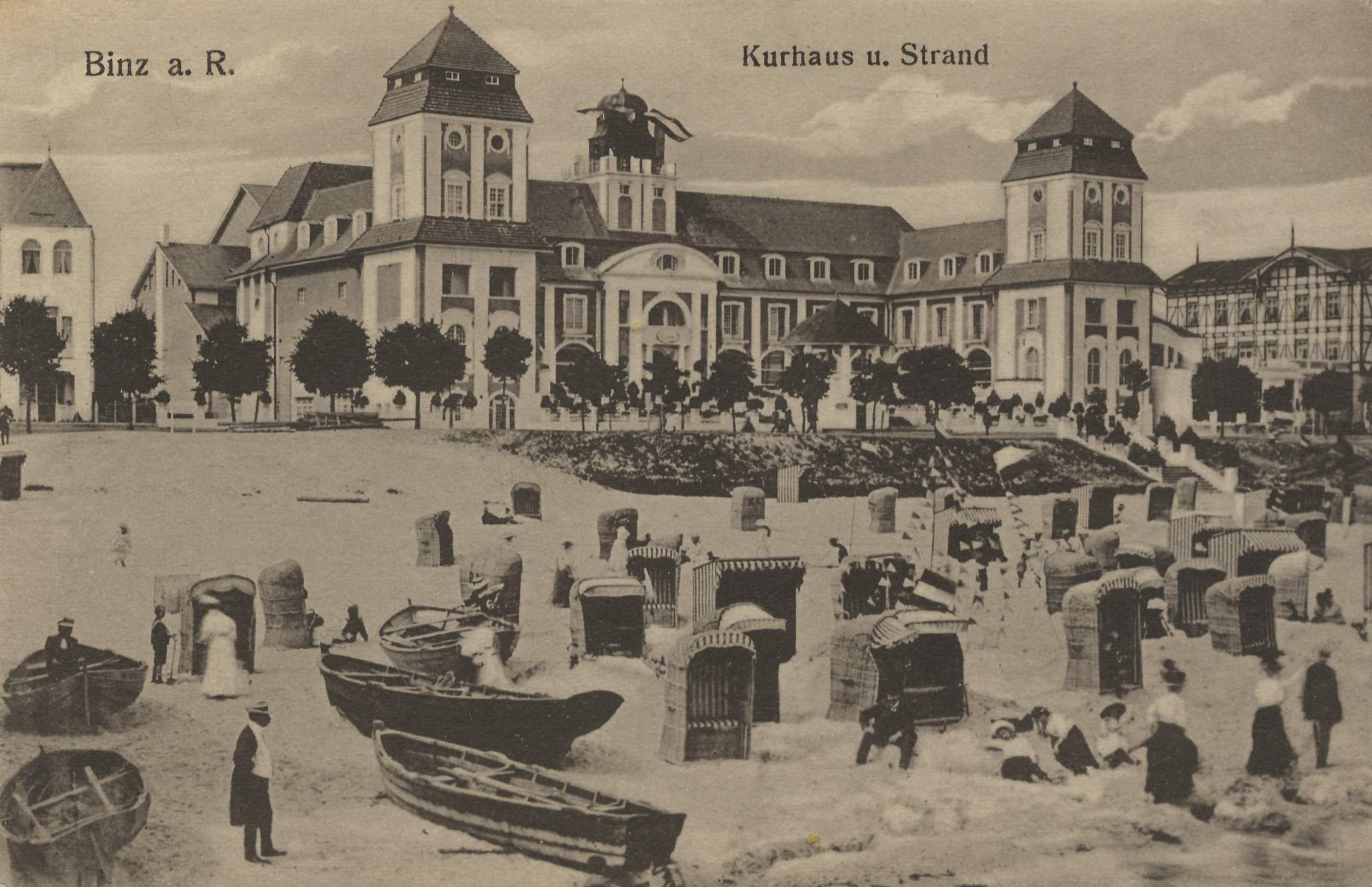 Binz a. R. Kurhaus u. Strand.